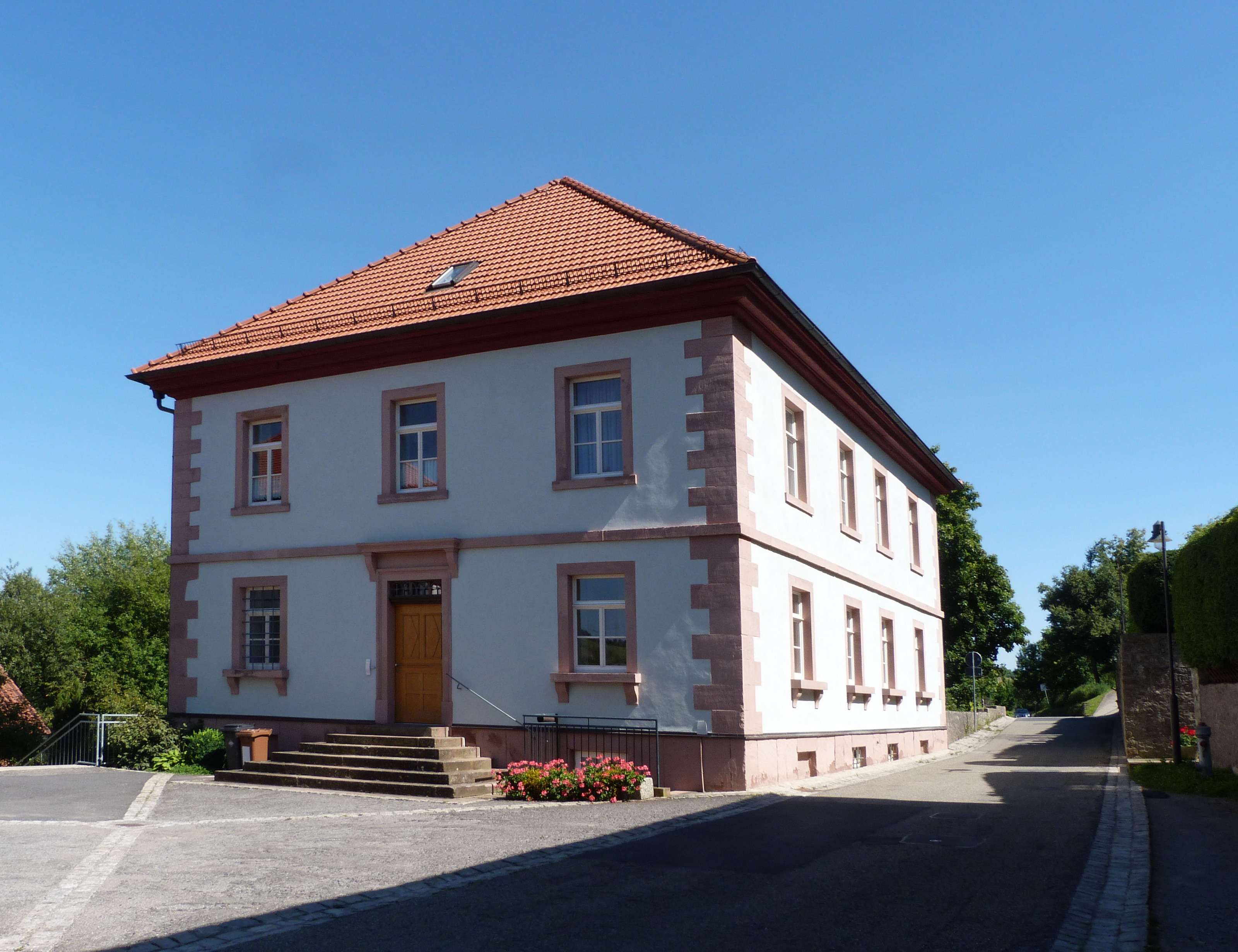 Ehemalige Zehntscheune in Rossbrunn, Unterfranken